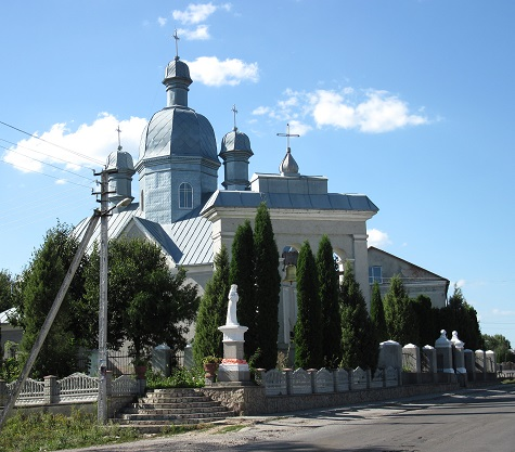 церква св. Михаїла у с. Мшанець (1794)